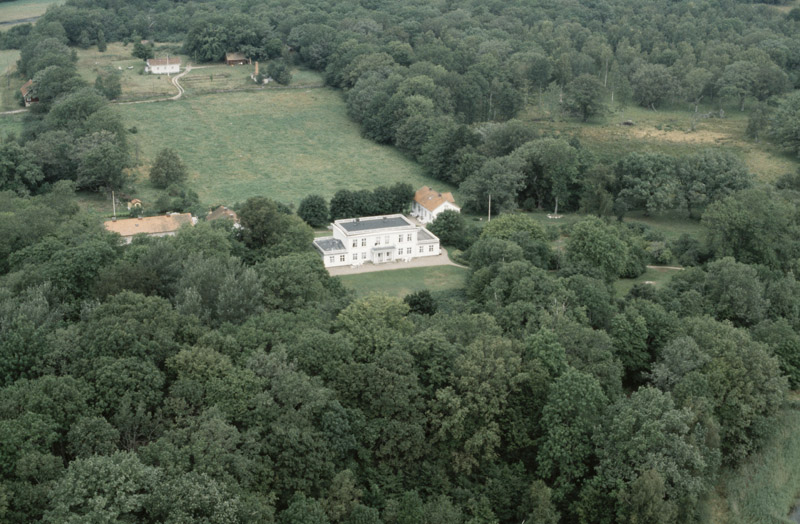 Tromtö herrgård / säteri. Herrgården omges av naturreservatet Tromtö. Bilden är tagen mot (väderstreck): NNV Motiv: Tromtö Nyckelord: Flygbilder, Naturreservat, Riksintressen Kategori: Herrgårds-/slottslandskap Tromtö herrgård / säteri. Herrgården omges av naturreservatet Tromtö. Bilden är tagen mot (väderstreck): NNV.